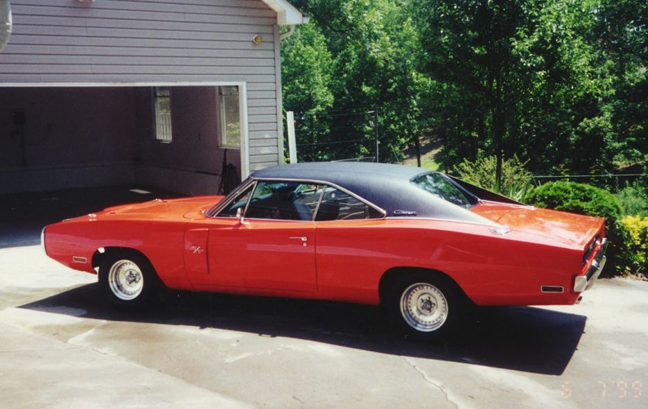 Hemi Orange 70 Dodge Charger RT 440 EFI